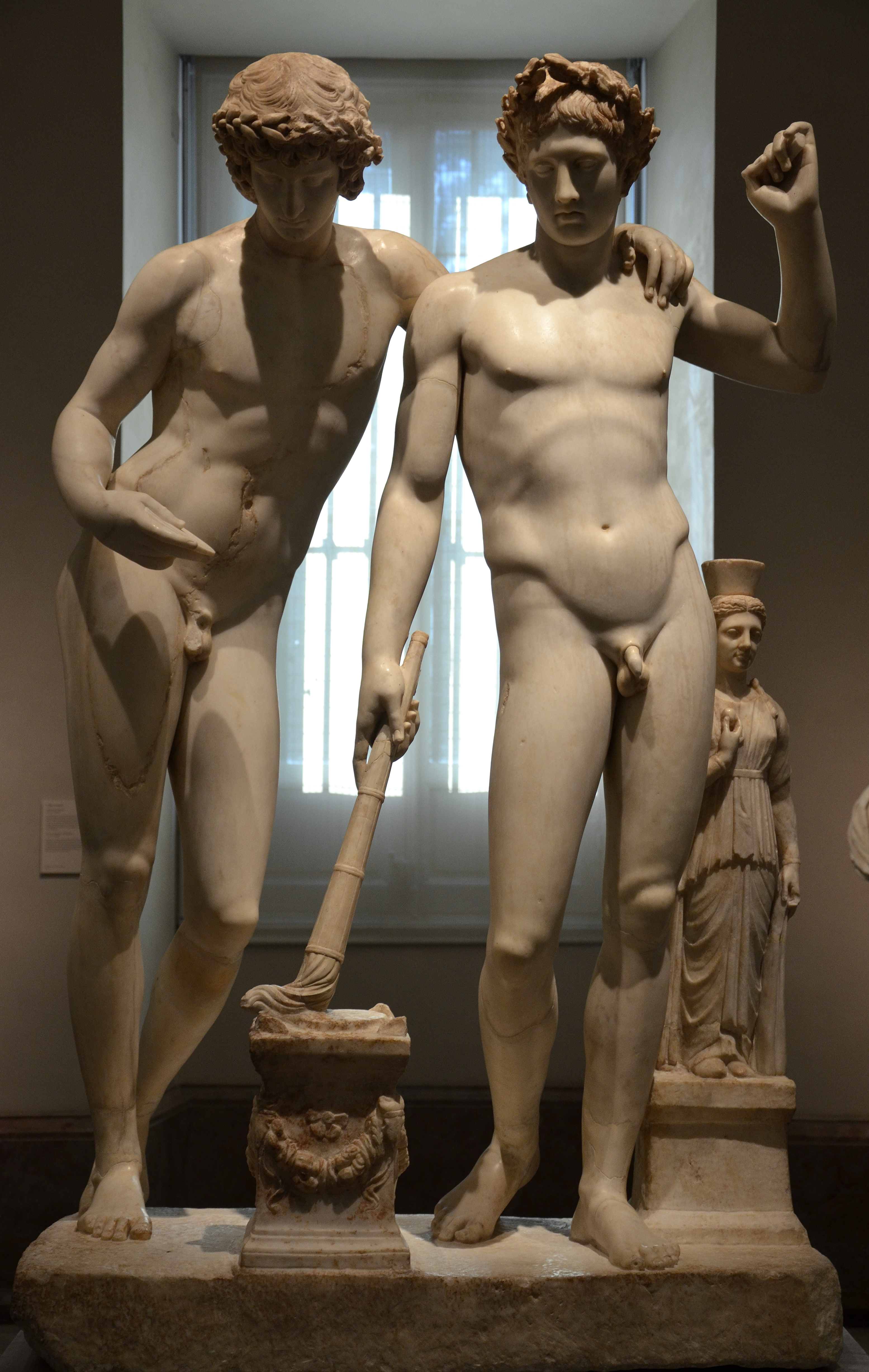 Ofrenda de Orestes y Pílades.